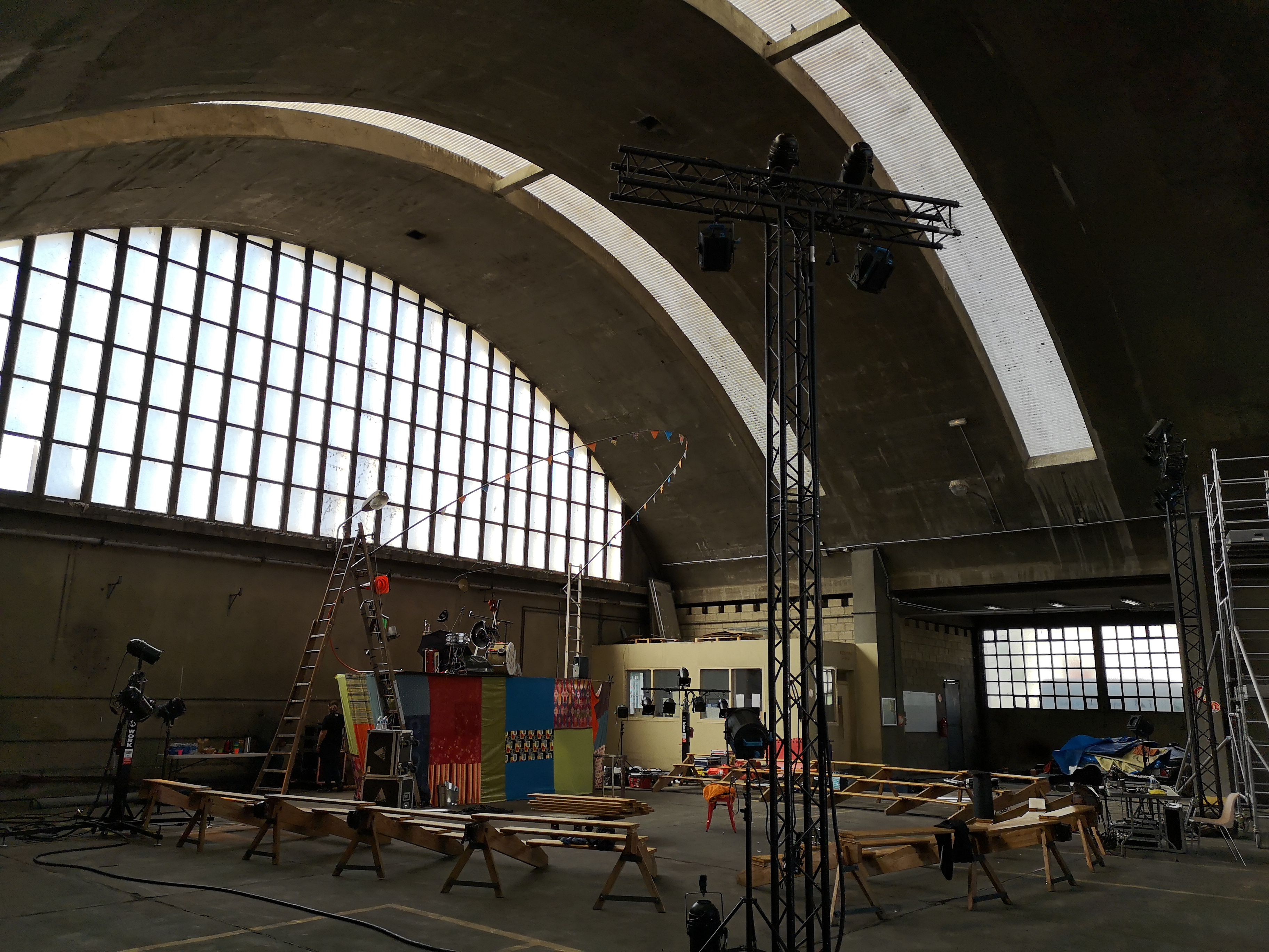 Bâtiment municipal appelé Dôme à Houilles, construit dans les années 1950